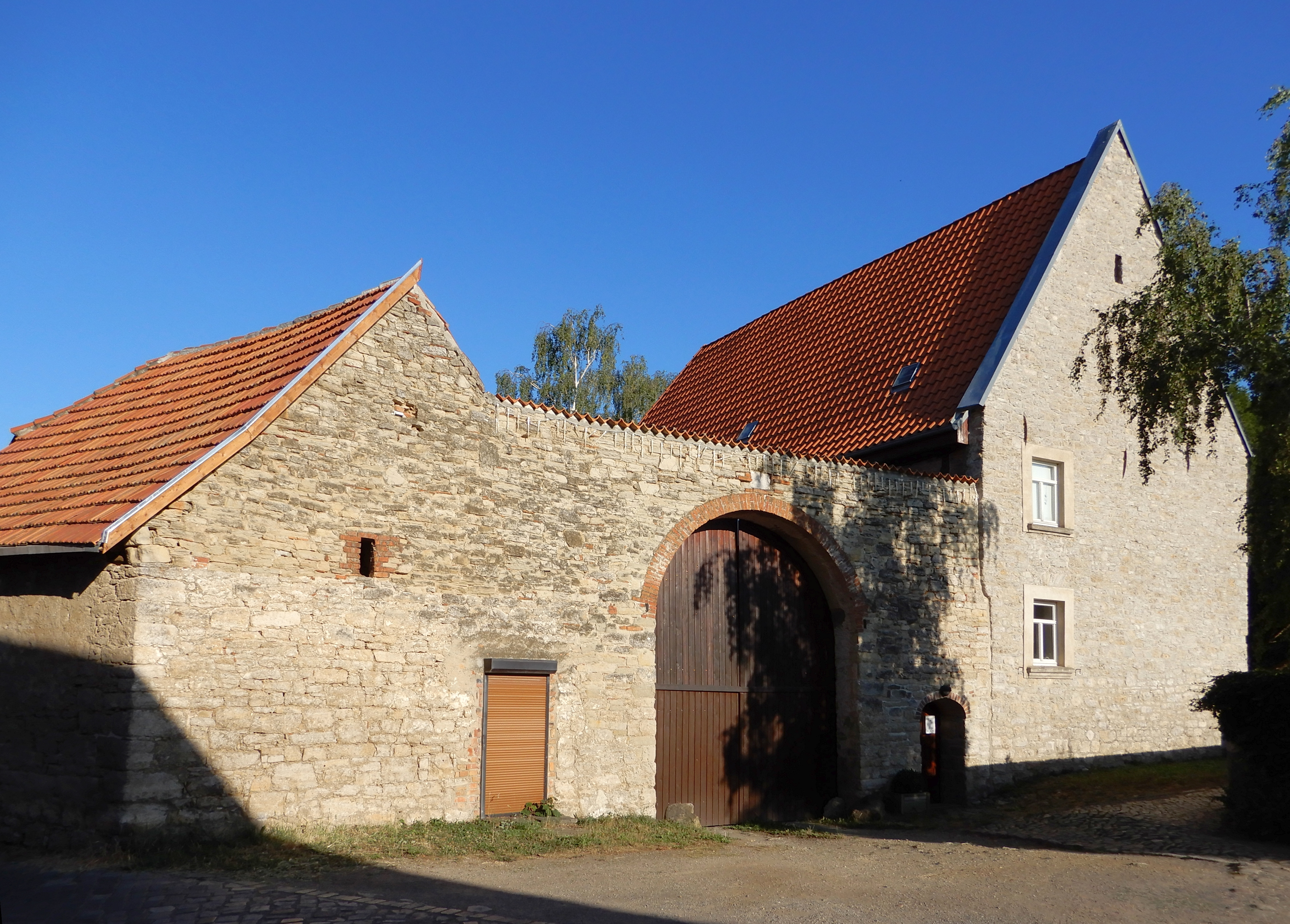 Gatersleben, Schulstraße 10